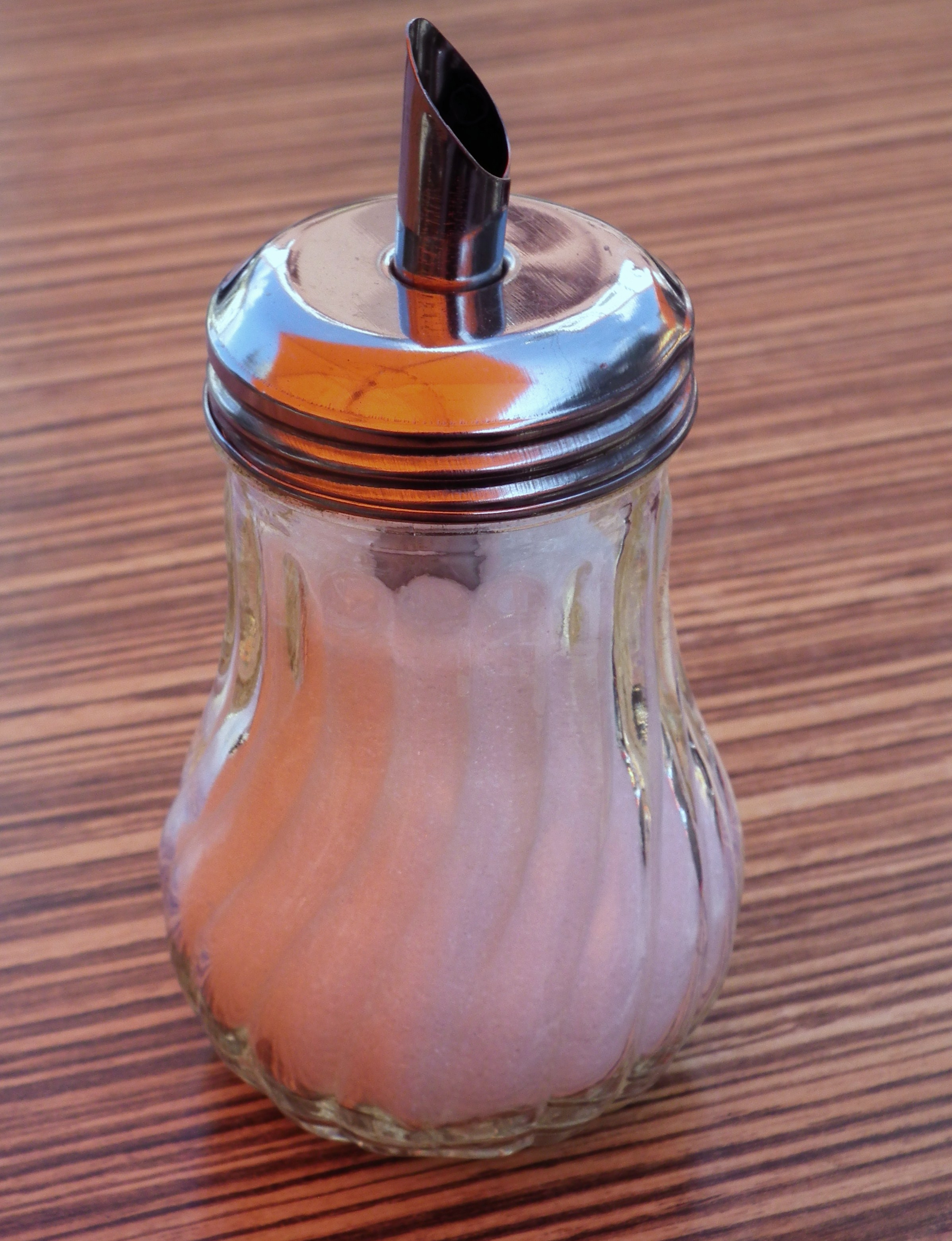 Zuckerstreuer